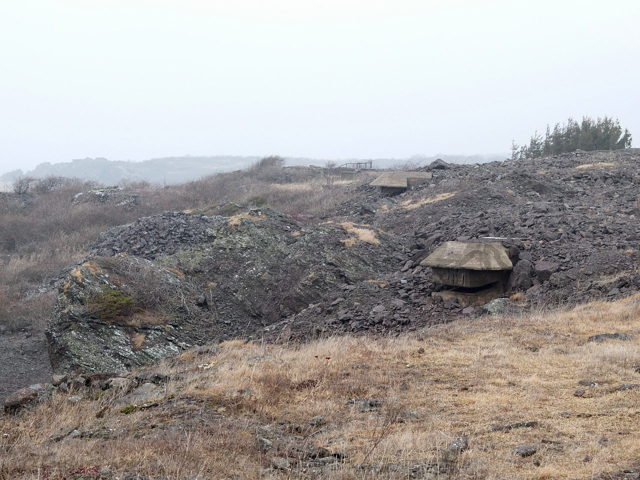 Rauøy fort i Oslofjorden